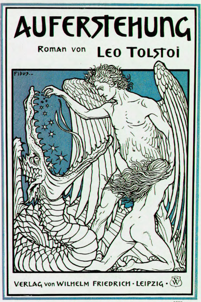 Fidus (Hugo Höppener): Umschlagzeichnung für Leo Tolstoi's Äuferstehung, 1900. Verlag von Wilhelm Friedrich, Leipzig